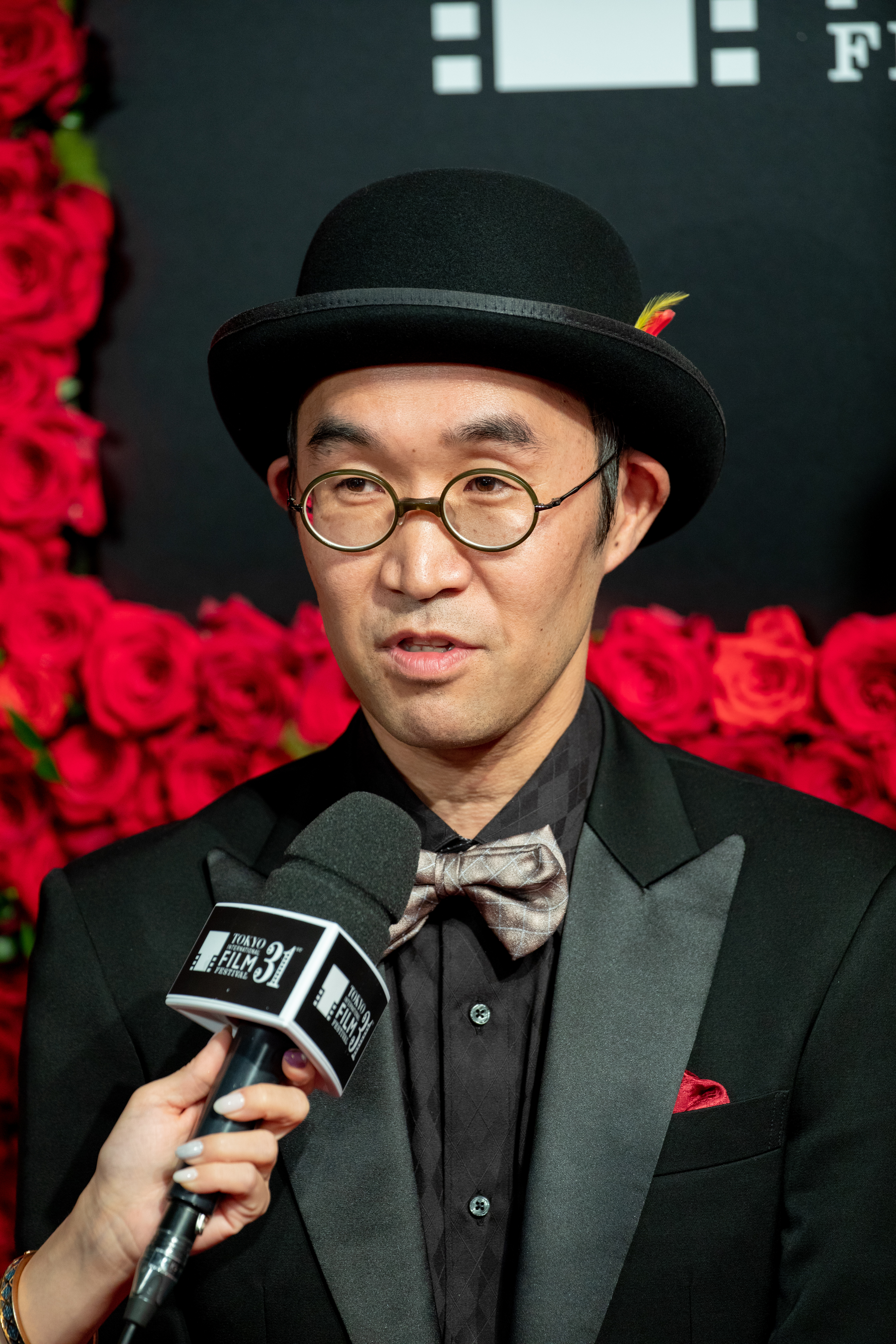 第30回 東京国際映画祭 オープニングセレモニー 野尻克己 (鈴木家の嘘)